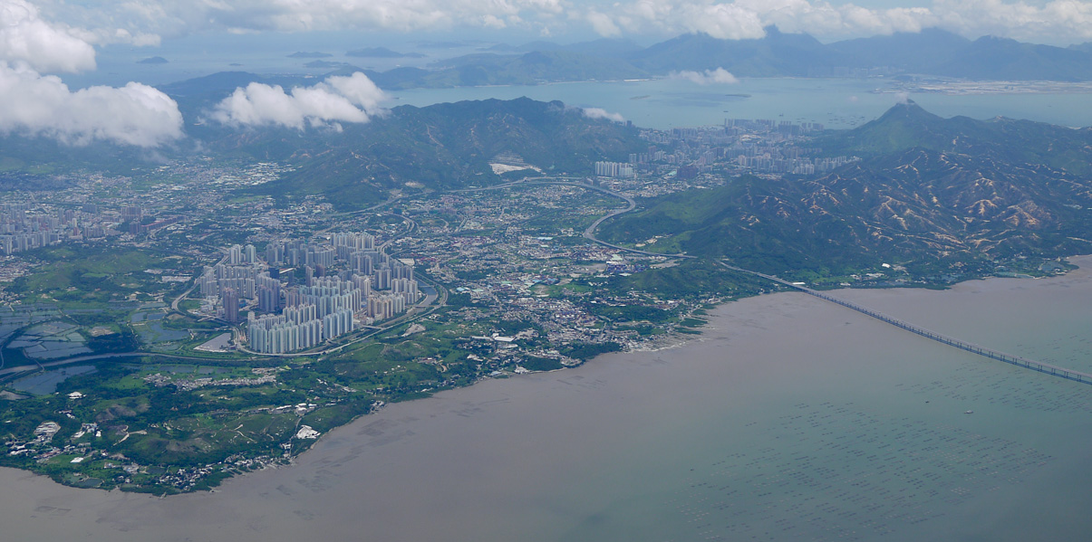 香港天水圍空拍